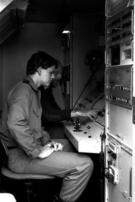 Interieur van de Flycatcher vuurleidingsradar van de Koninklijke Luchtmacht. Een leerling krijgt instructie van een sergeant-majoor van de LETS.